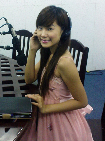 Lương Bích Hữu trong một buổi giao lưu tại VOH (hình 2)